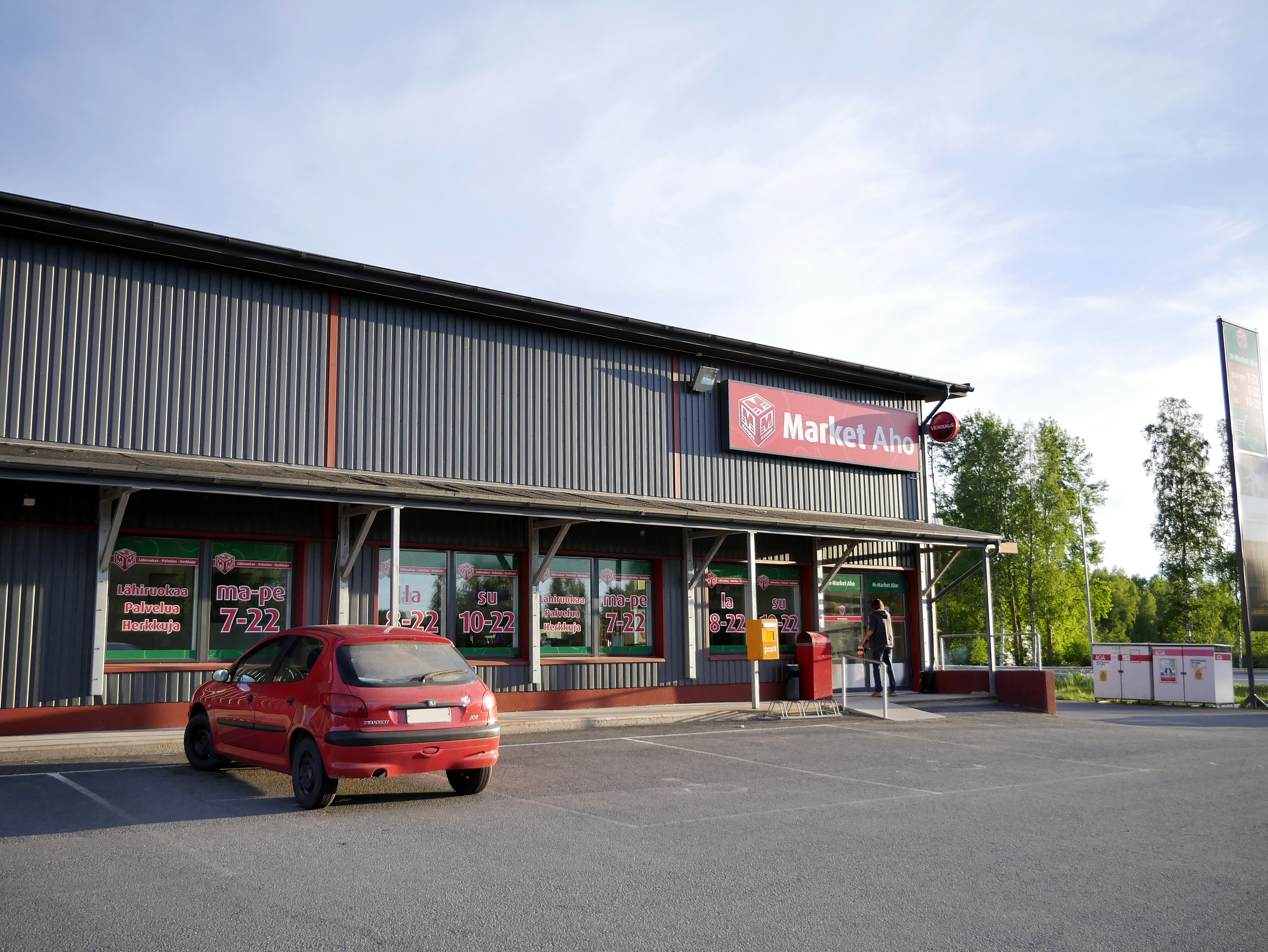 M-Market Aho Ilmajoen Ahonkylässä.